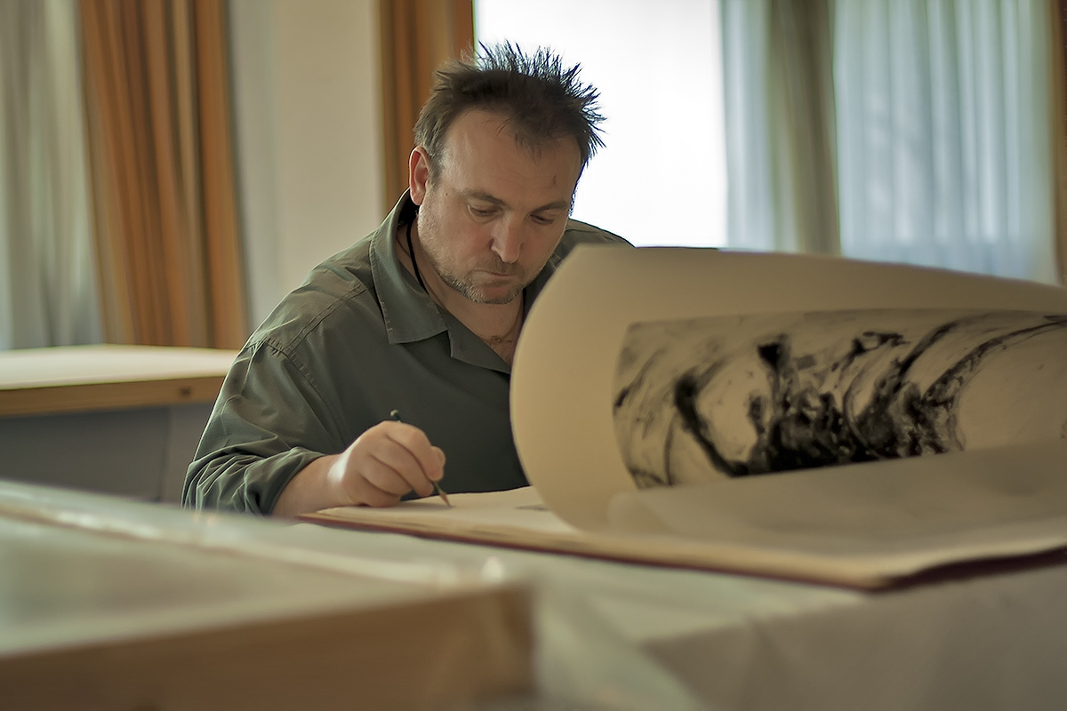 Spanish painter Miquel Barceló in feb. 2011